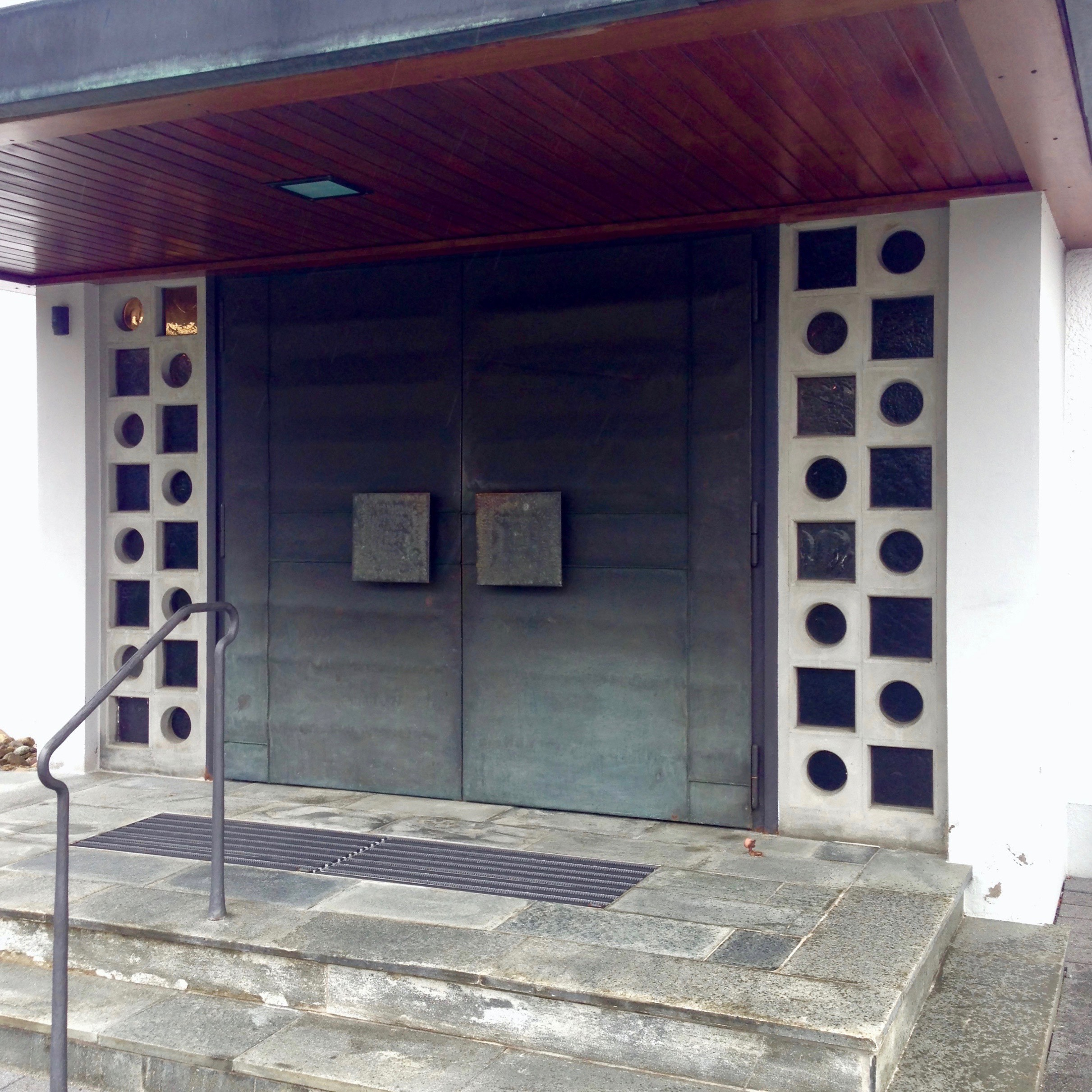 Die von Erich Walter Stadler geschaffene Flügeltüre an der Seite der Kath. Pfarramt St. Maria in Meckenbeuren